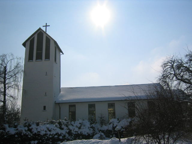 Evangelische Kirche Bonndorf, erbaut 1953